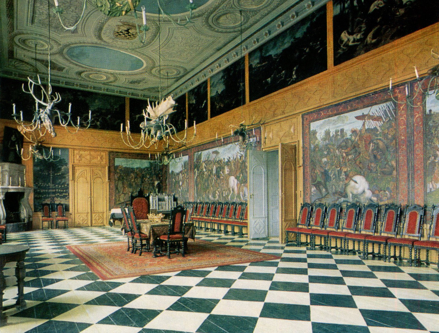 Riddarsalen i Stora Sundby slott